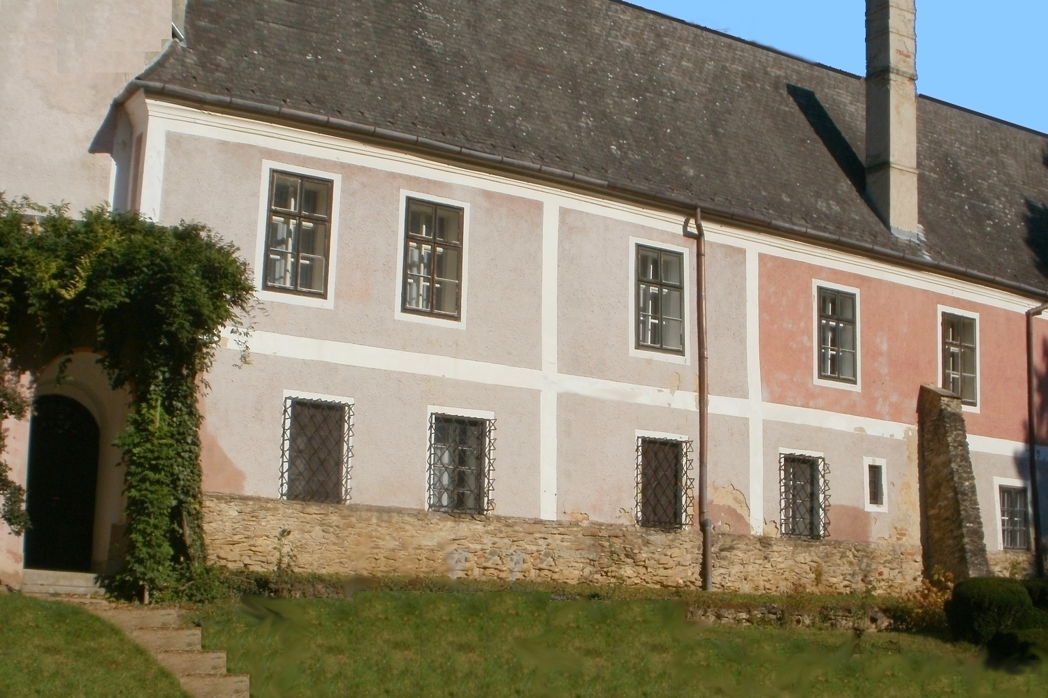 v. Sibrik kastély (Bozsok, Rákóczi Ferenc u. 1 .) This is a photo of a monument in Hungary. Identifier: 8817